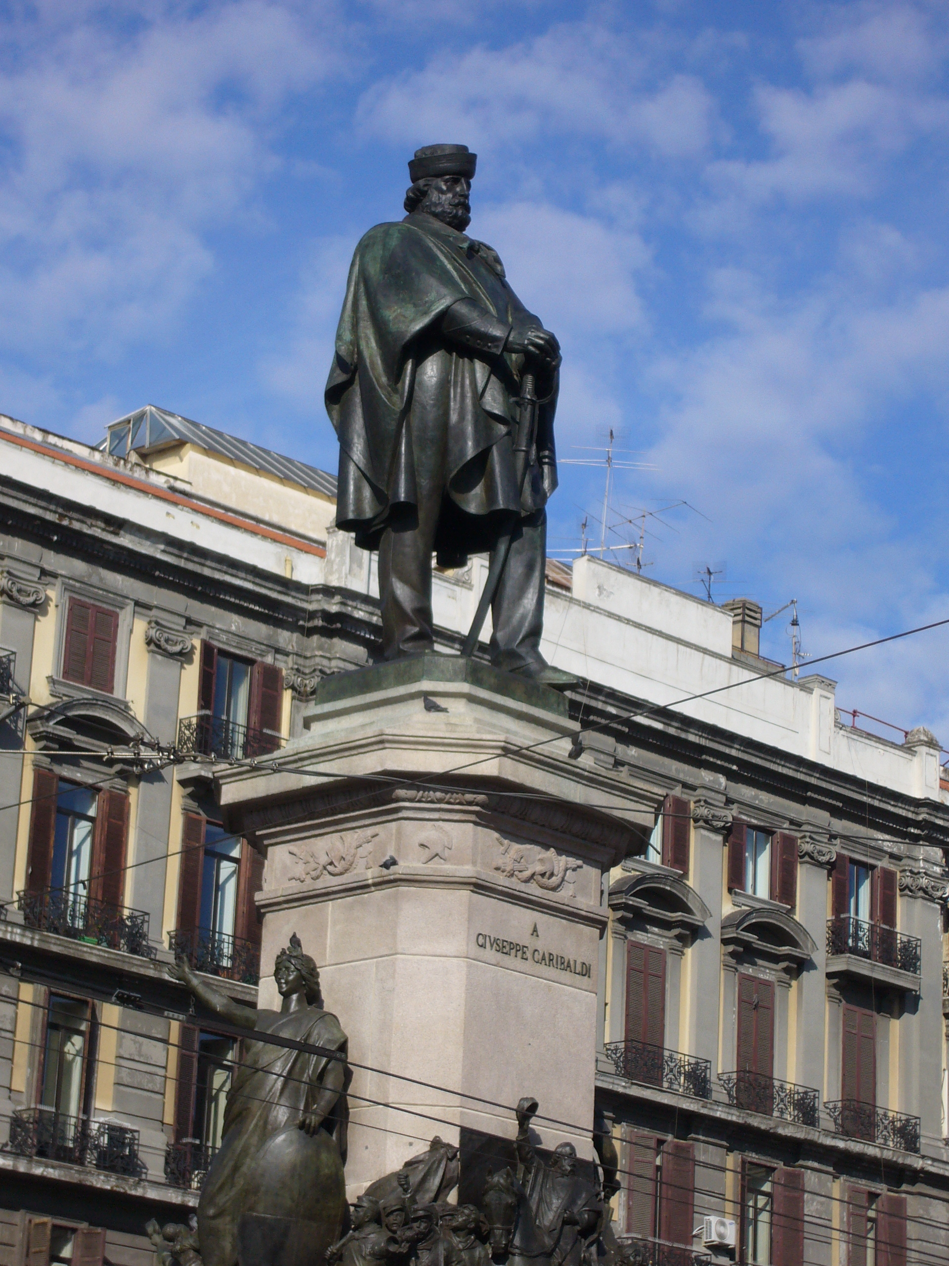 Statua di Giuseppe Garibaldi sita a Napoli in Piazza Garibaldi. Opera del 1904 di Cesare Zocchi (1851-1922).